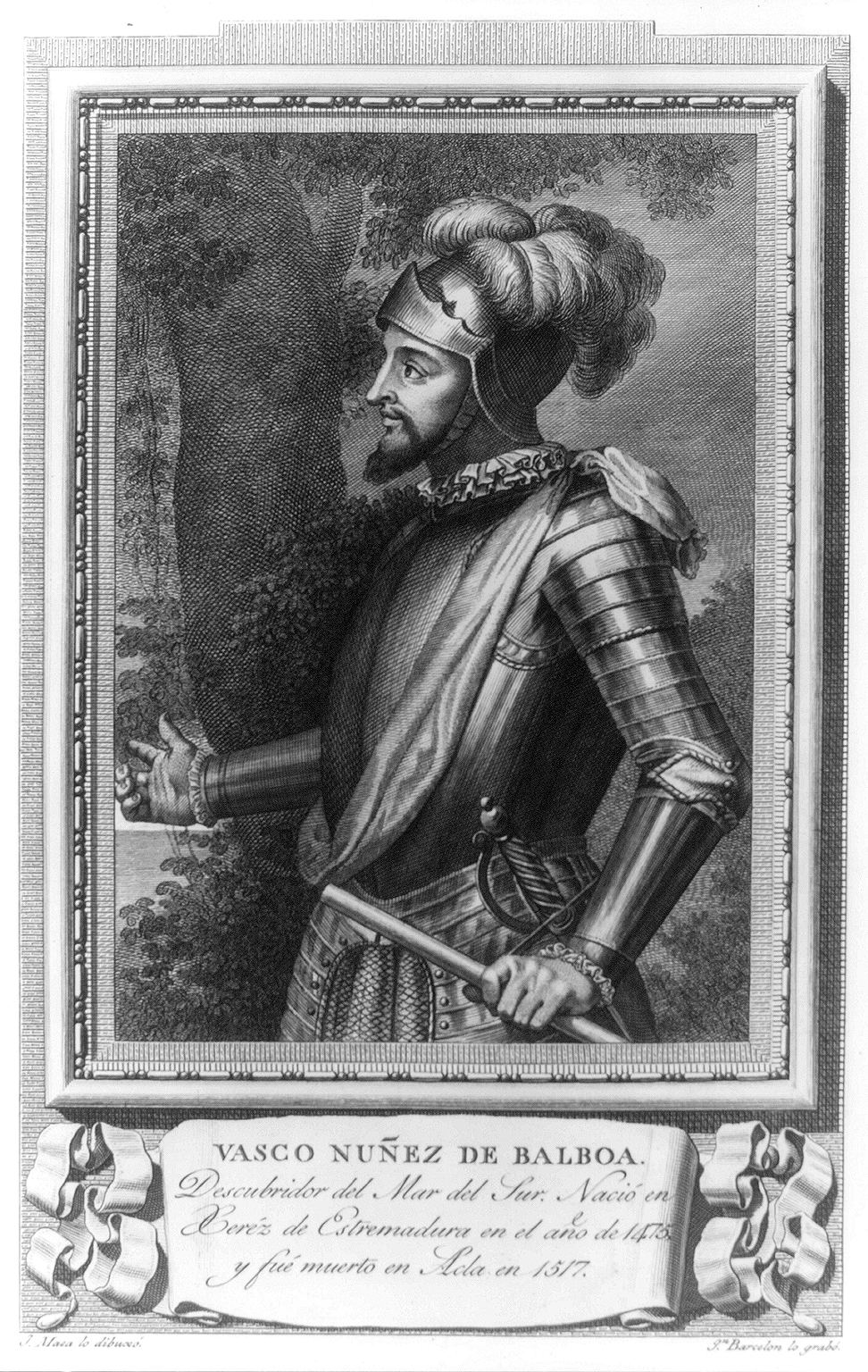 Engraving, VASCO NUÑEZ DE BALBOA.